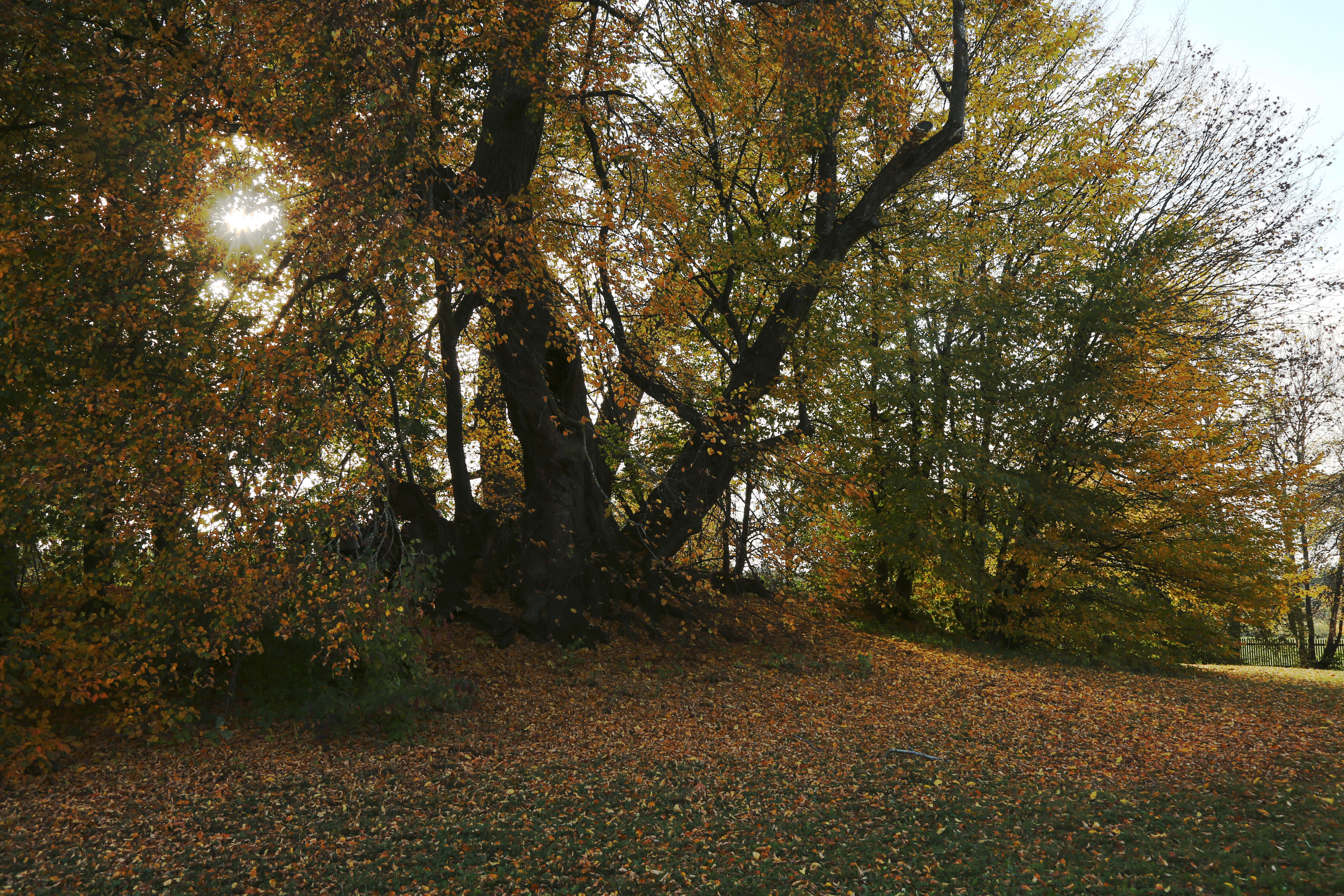 Der Burgstall Warnberg ist der höchste Punkt der Stadt München mit 580m über dem Meer. Es handelt sich um einen kleinen Burghügel, auf dem wohl eine Turmburg stand. Der Hügel ist mir einem Ring aus Buchen bestanden. Er befindet sich auf dem Gelände des Gutshofs Warnberg mit Marienanstalt und Realschule.